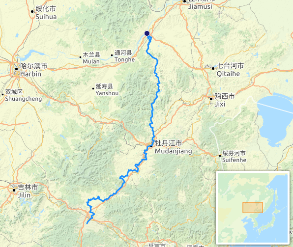 carte réalisée sur umap, [1] This map may be incomplete, and may contain errors. Don't rely solely on it for navigation.